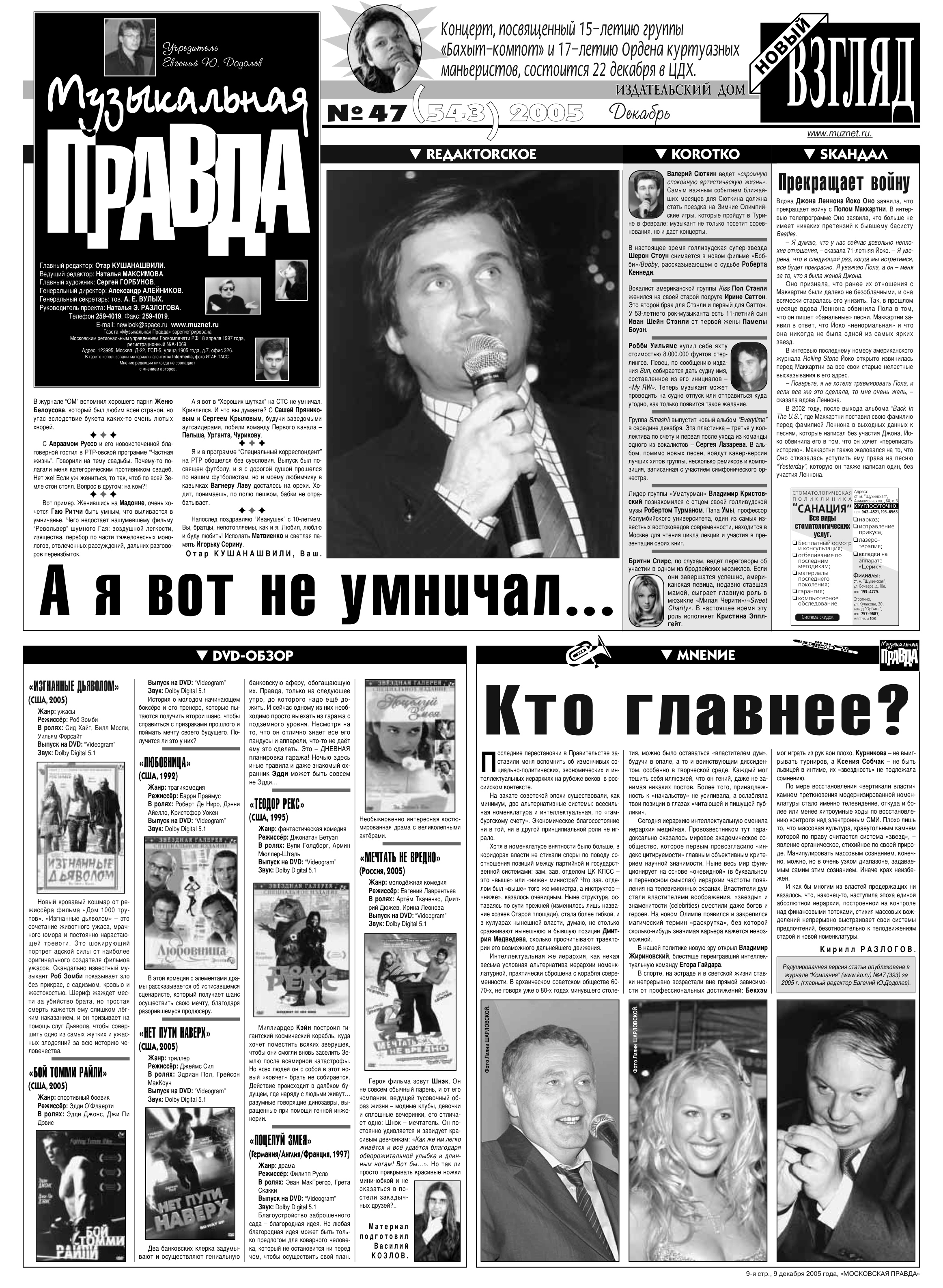 Первая страница газеты «Музыкальная правда», №47(543), 2005.